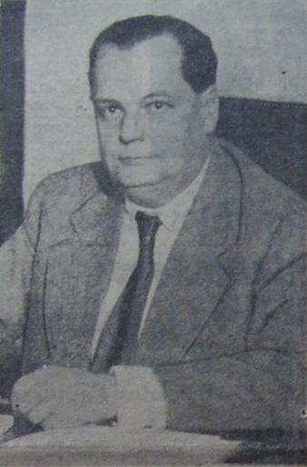 El economista Miguel Miranda, director del IAPI y presidente del Banco Central de la República Argentina al comienzo de la primera presidencia de Juan Domingo Perón (1946-1952)